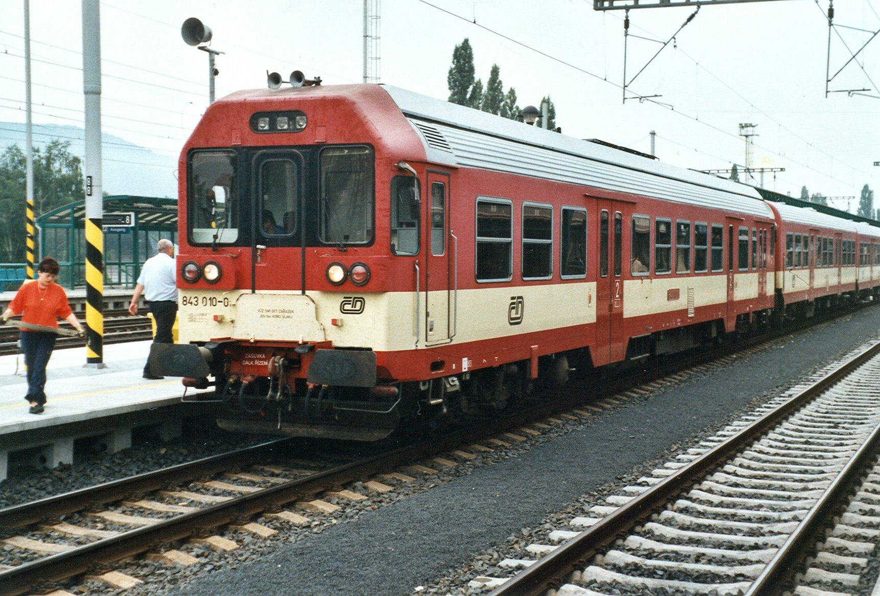 Triebwagen der Reihe 843, fotografiert 2003 in Decin h.l.n.